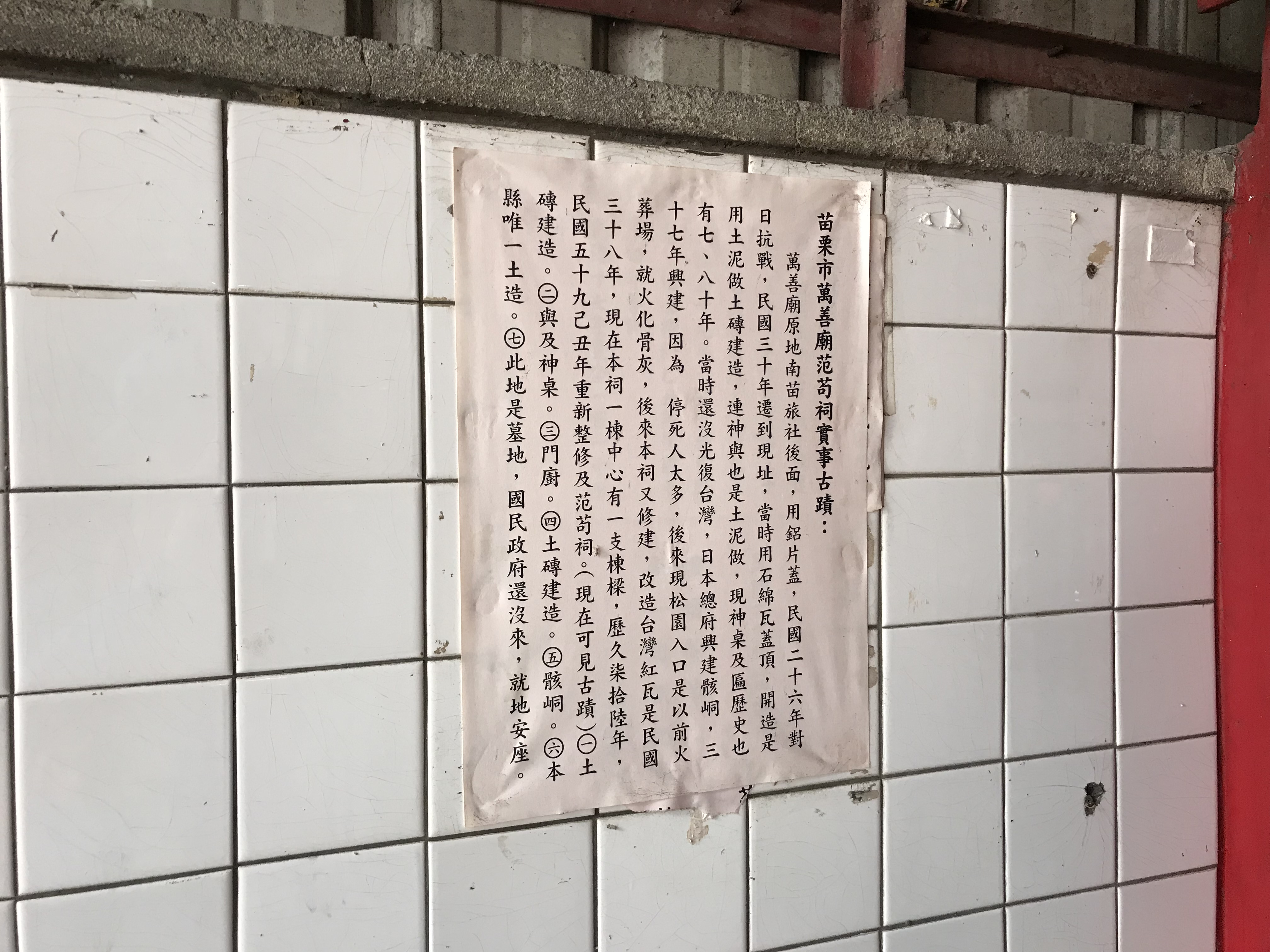 中文（台灣）: 范苟祠說明